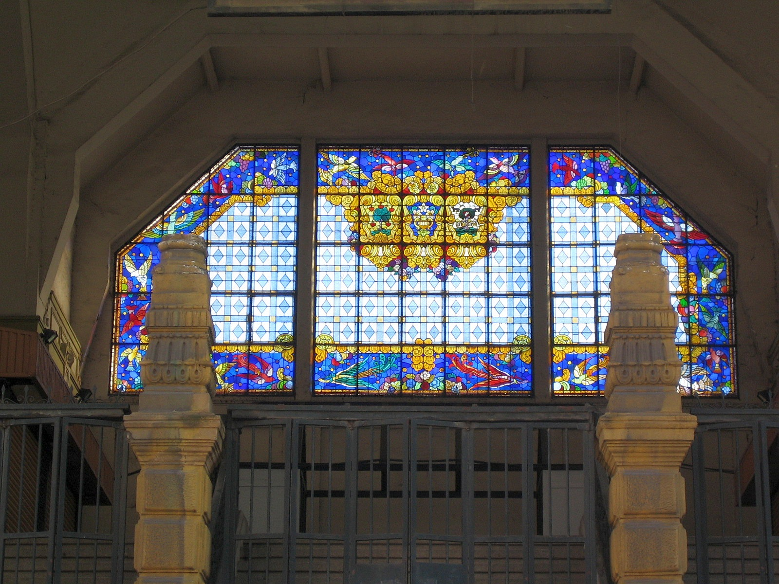 Bilboko Erriberako merkatuko fatxada